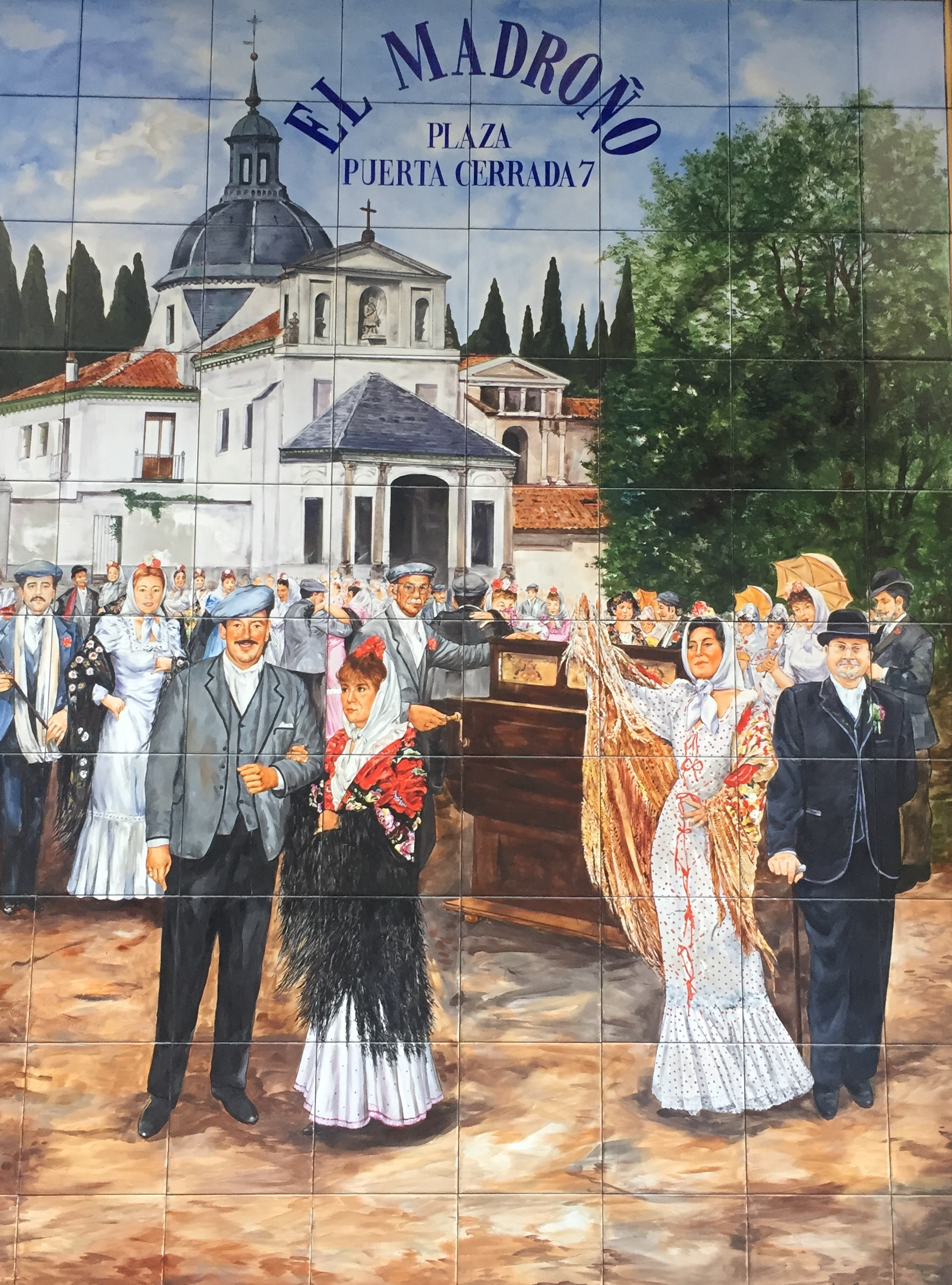 Azulejos en la Taberna El Madroño. Madrid, España